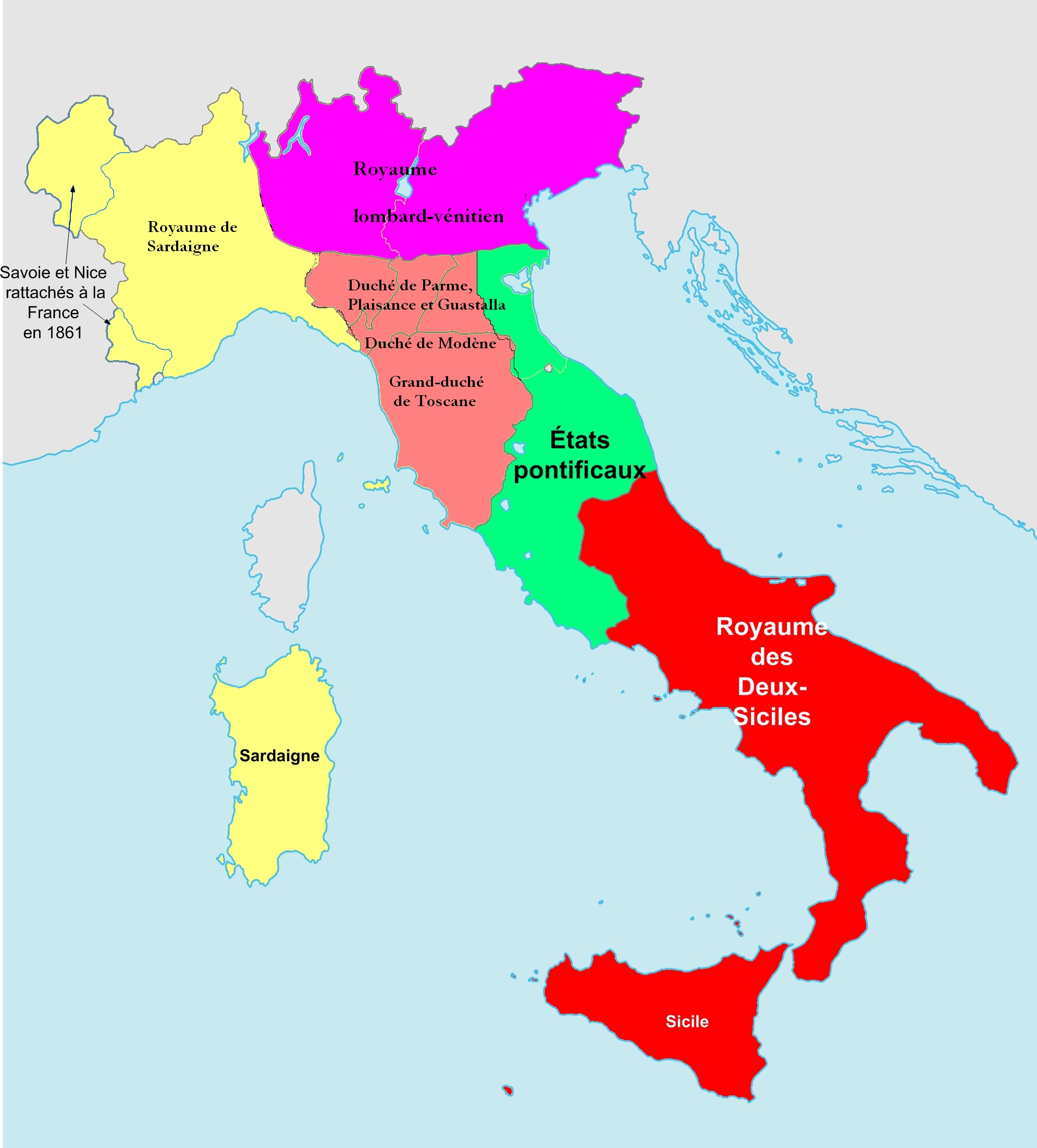 carte de l'Italie de 1815 à 1859